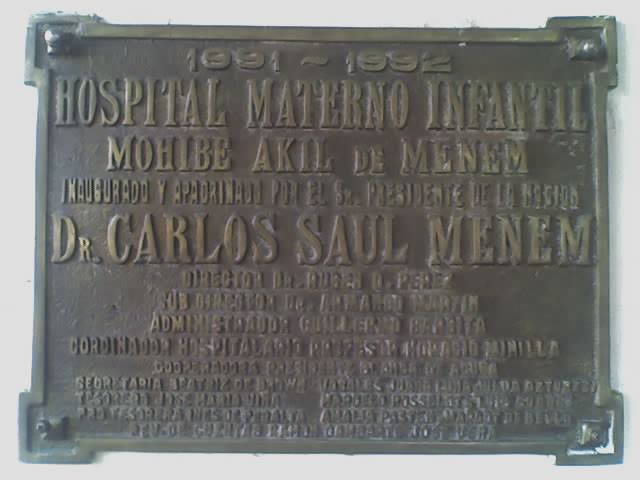 Placa de bronce colocada en la entrada del Hospital Mohibe Akil de Menem de la Localidad de Grand Bourg.